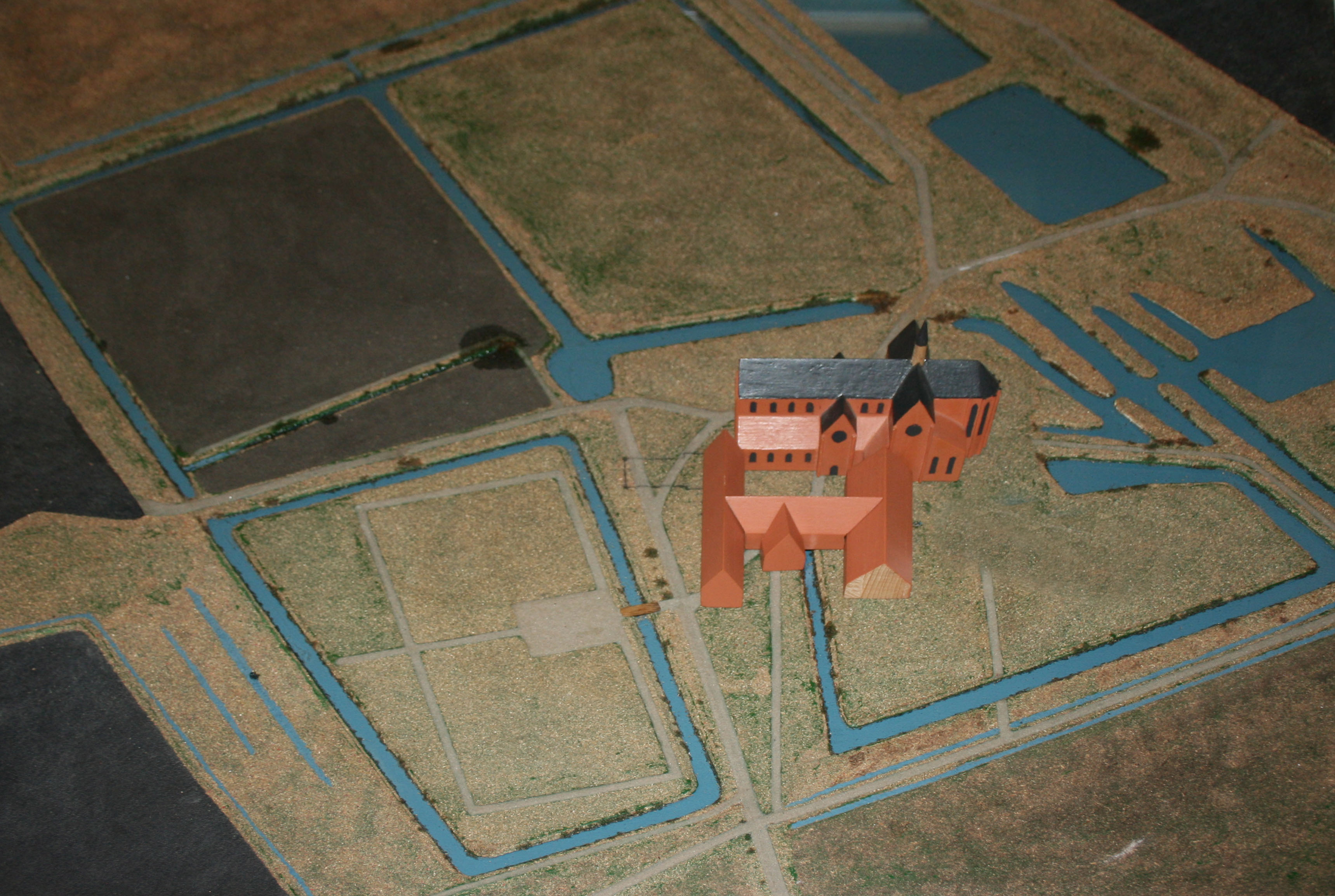 Kloster Ihlow- Modell der Gebäude auf der Wüstung